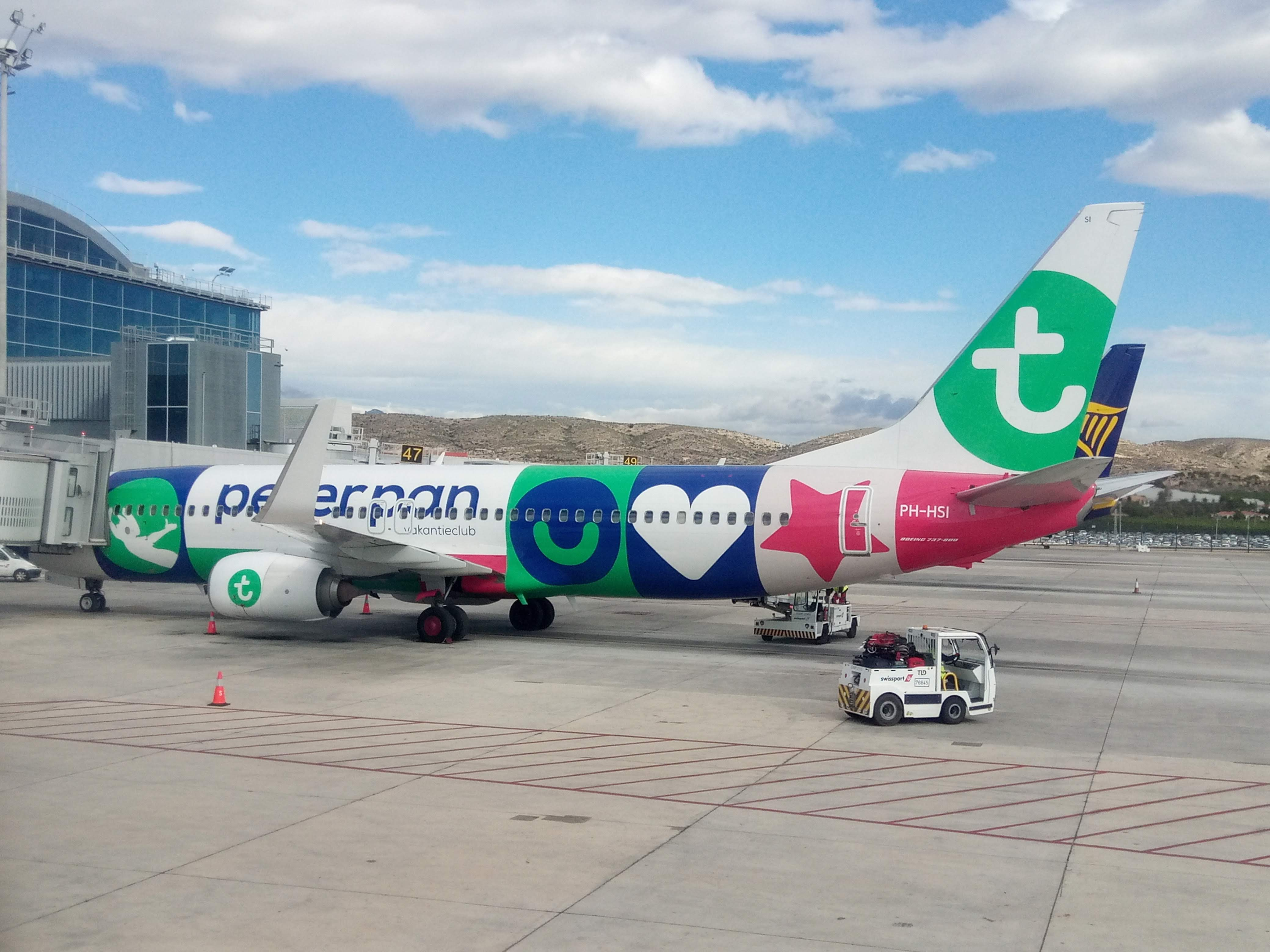 Transavia Nederland Boeing 737-800 in de kleuren van de Peter Pan stichting